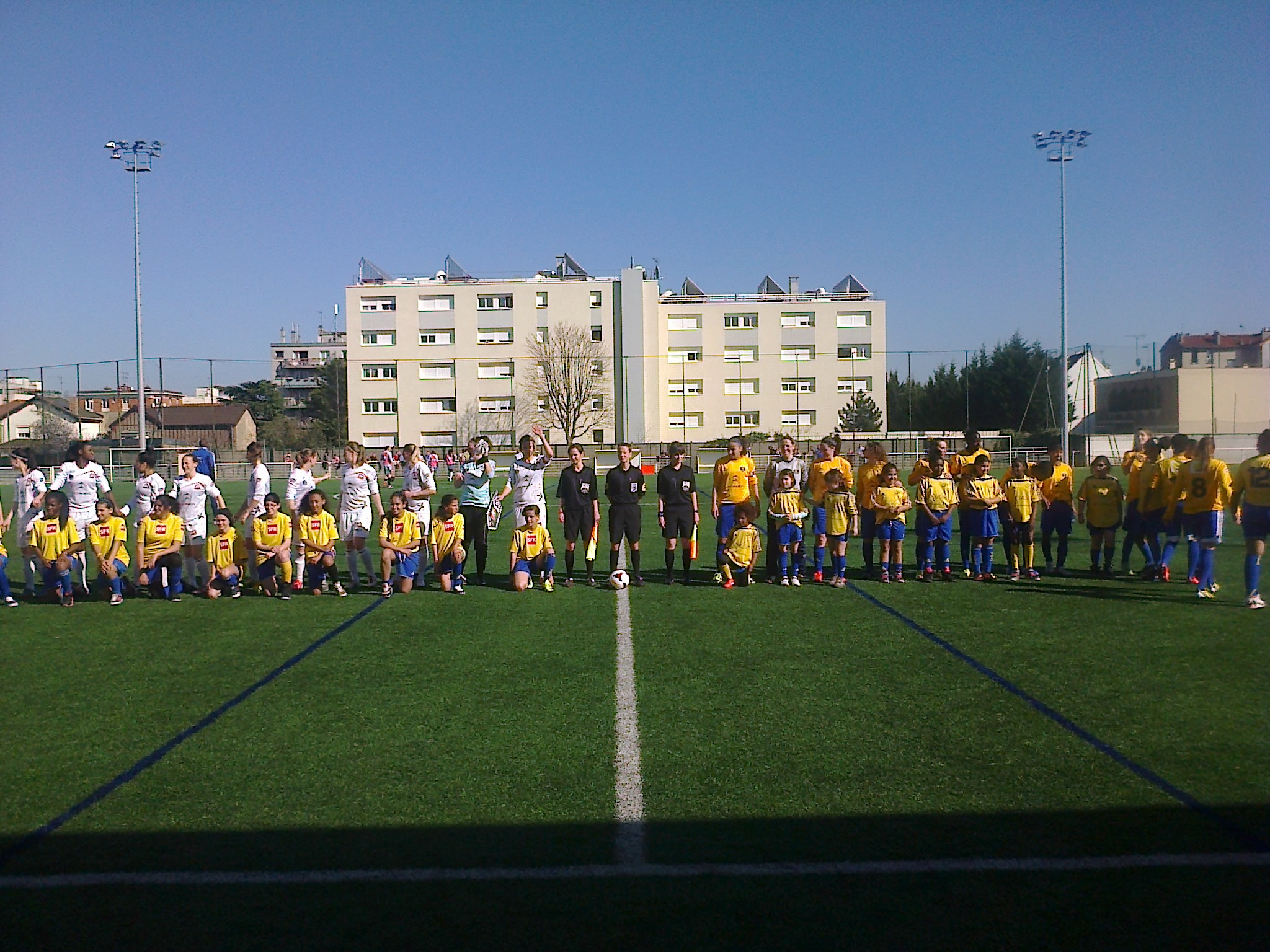 Présentation des équipes lors du match VGA Saint-Maur - FCF Juvisy du 16 mars 2014 en 1/8 de finale de Coupe de France.